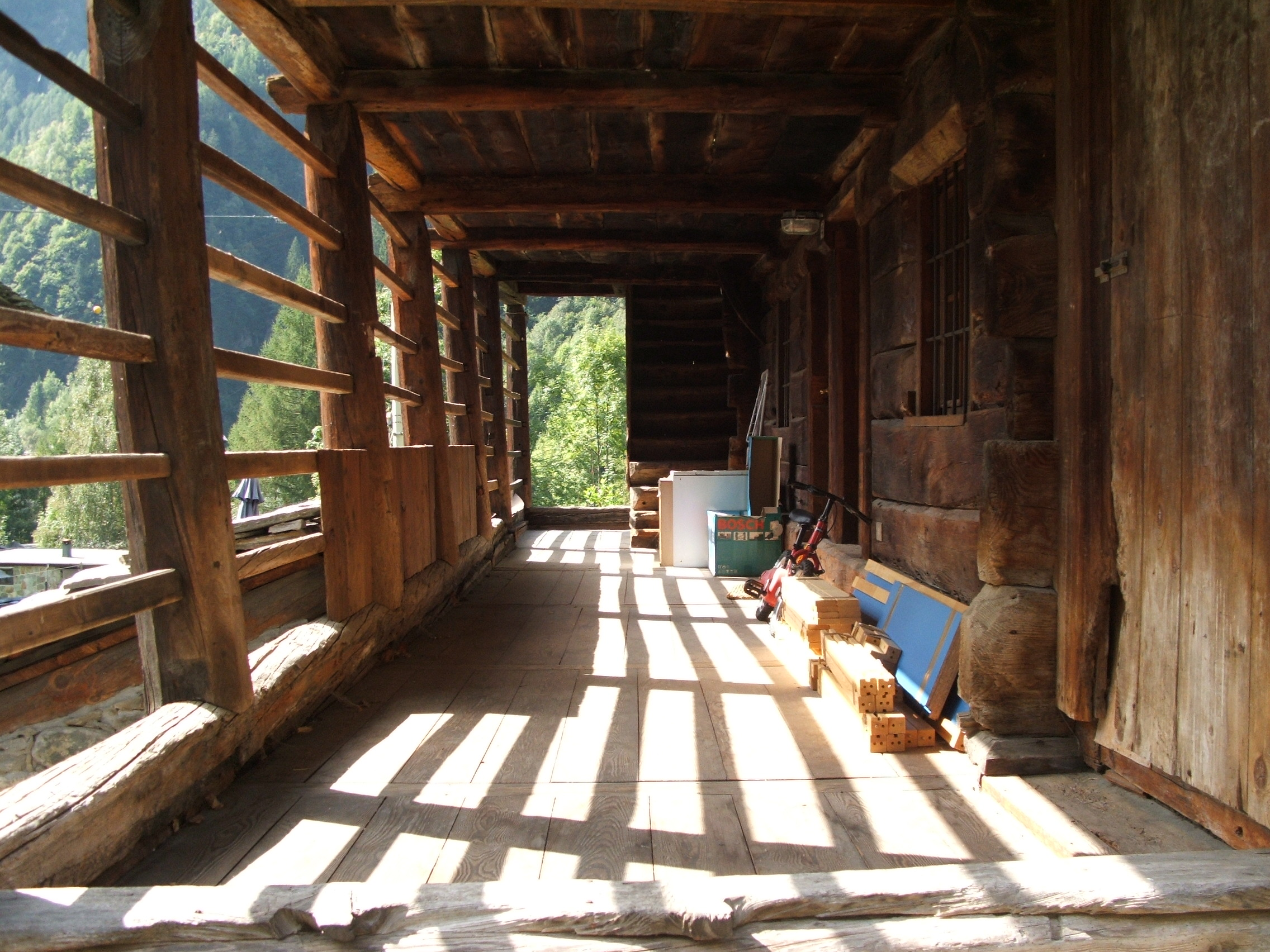 Immagine da Alagna Valsesia